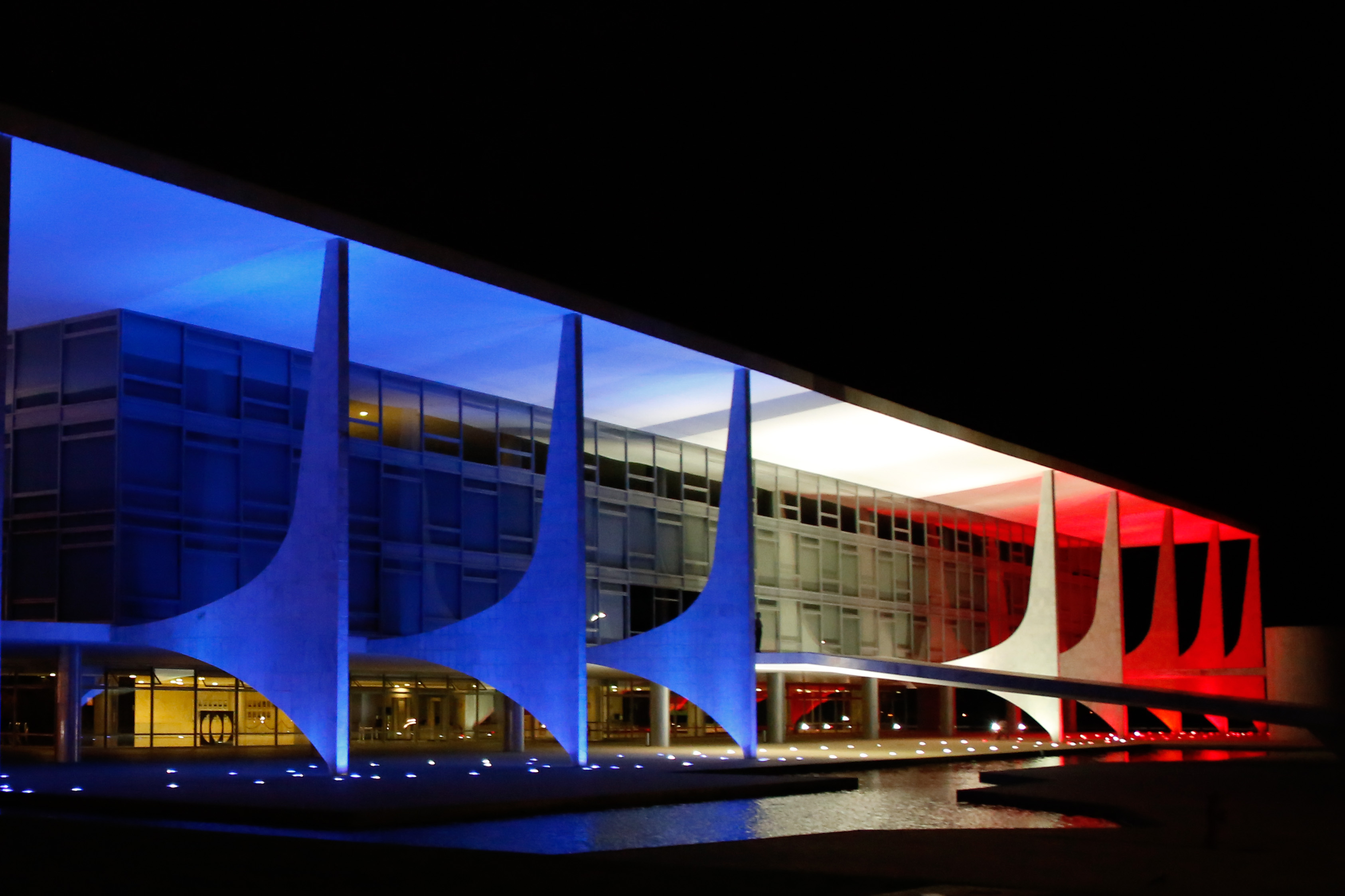 14/11/2015 - Em respeito à França, por ocasião dos ataques em Paris, o Palácio do Planalto fica iluminado com as cores da bandeira da França. - Brasília-DF Foto: Anderson Riedel